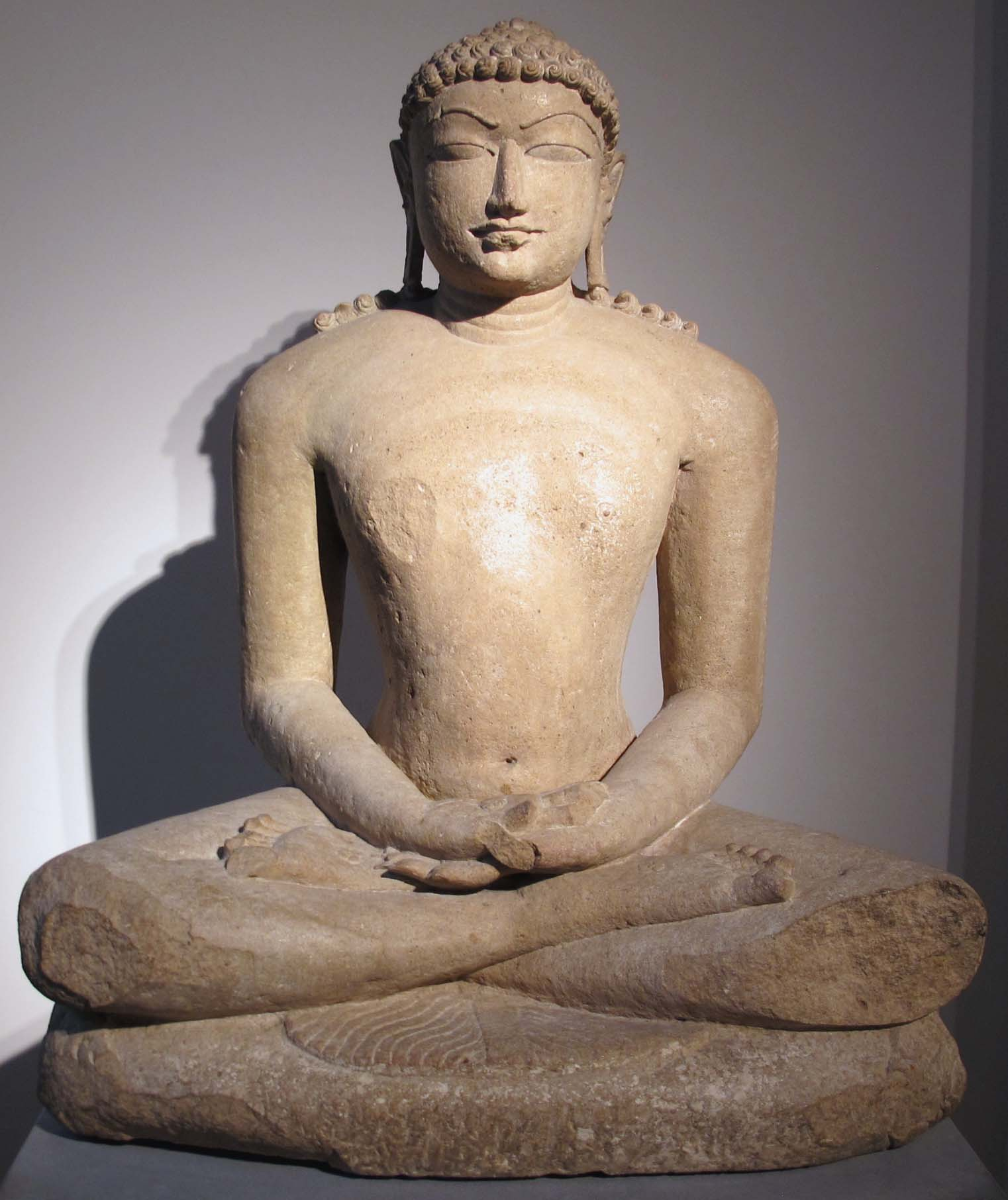 Madhya pradesh, epoca candella, tirthankara rishabhanatha, x-xi sec